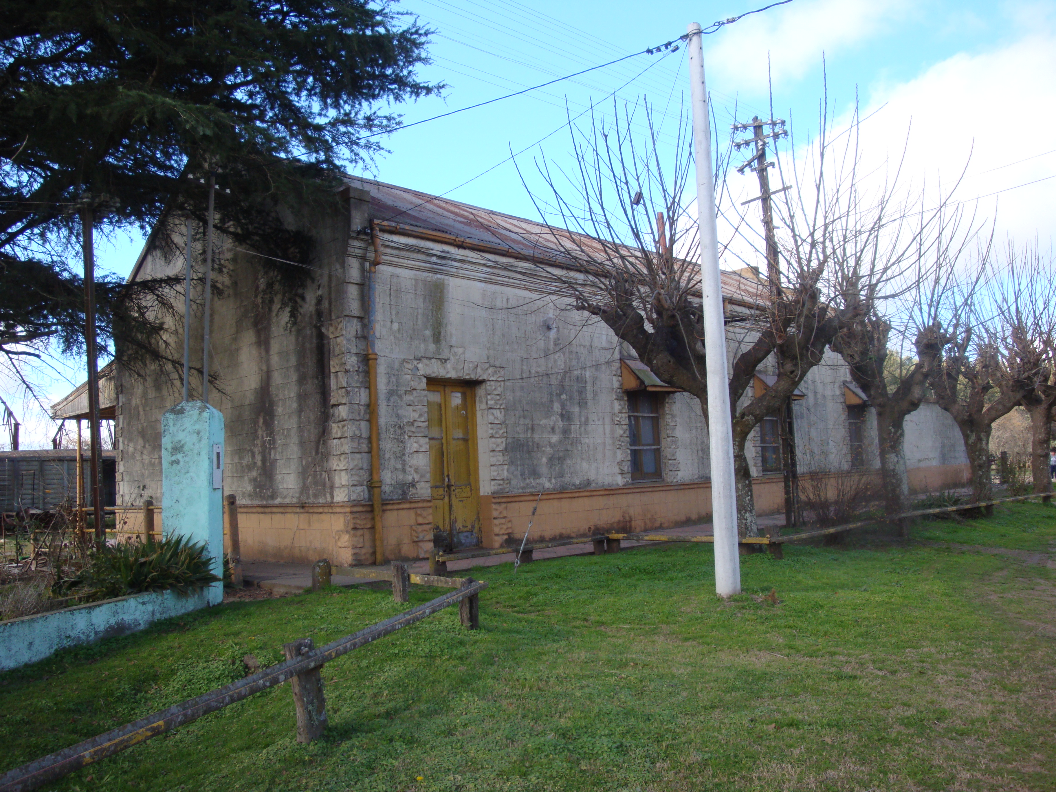 Estación de tren de Villa Lía en el partido de San Antonio de Areco, provincia de Buenos Aires, Argentina.